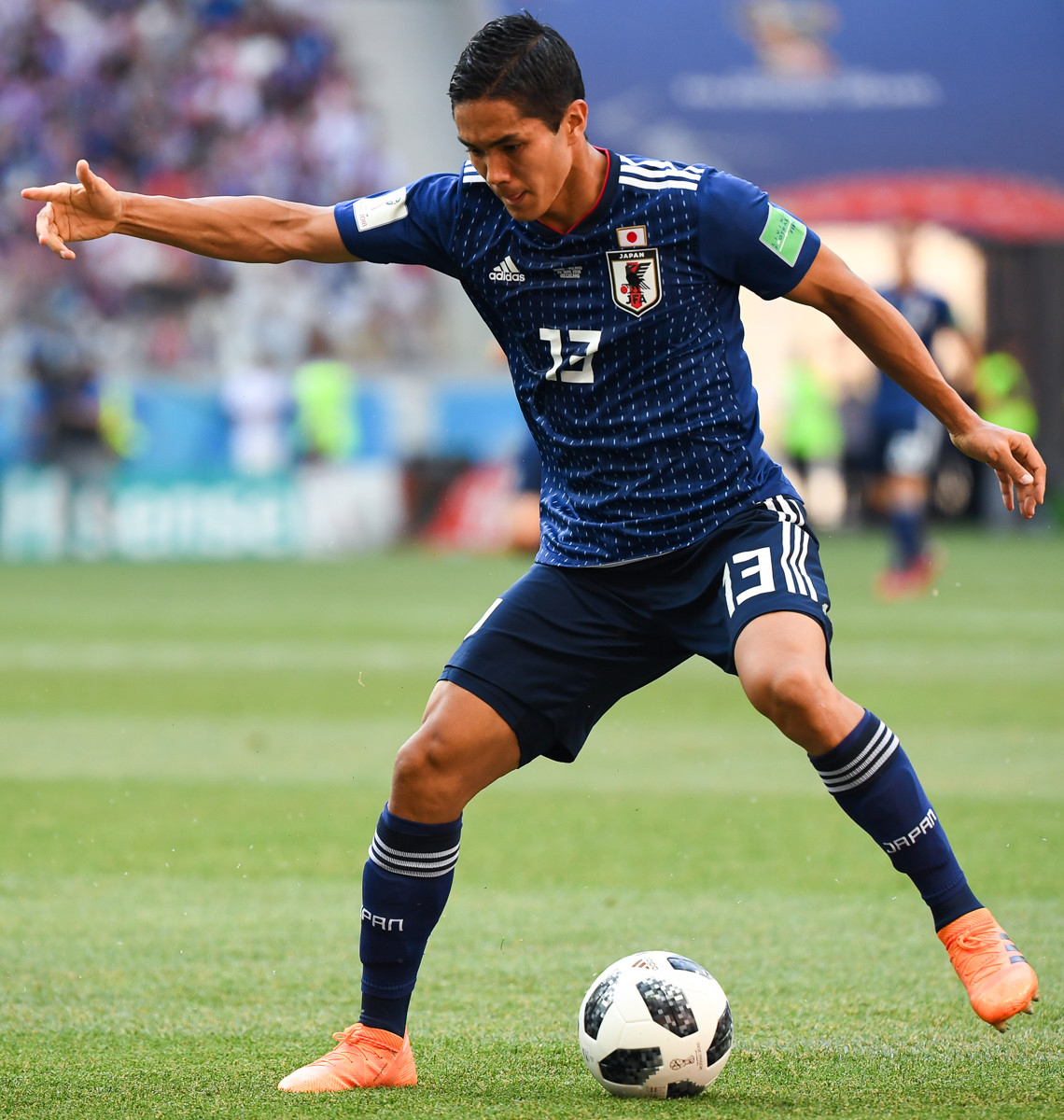 Япония проиграла Польше, но вышла в плей-офф